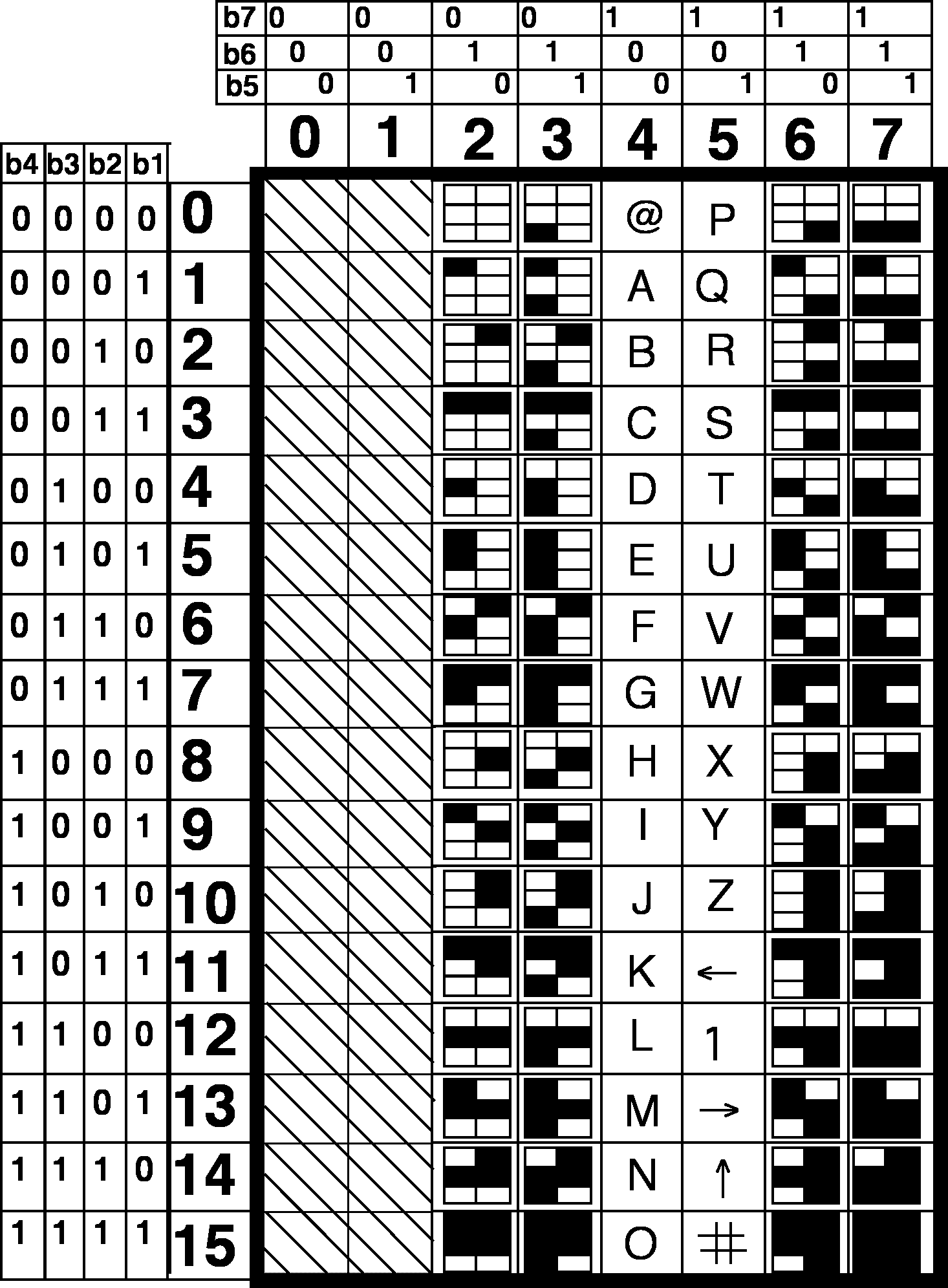 Extrait d'un cours donné à l'Université de Paris Dauphine sur l'histoire du Vidéotex : code mosaïque.